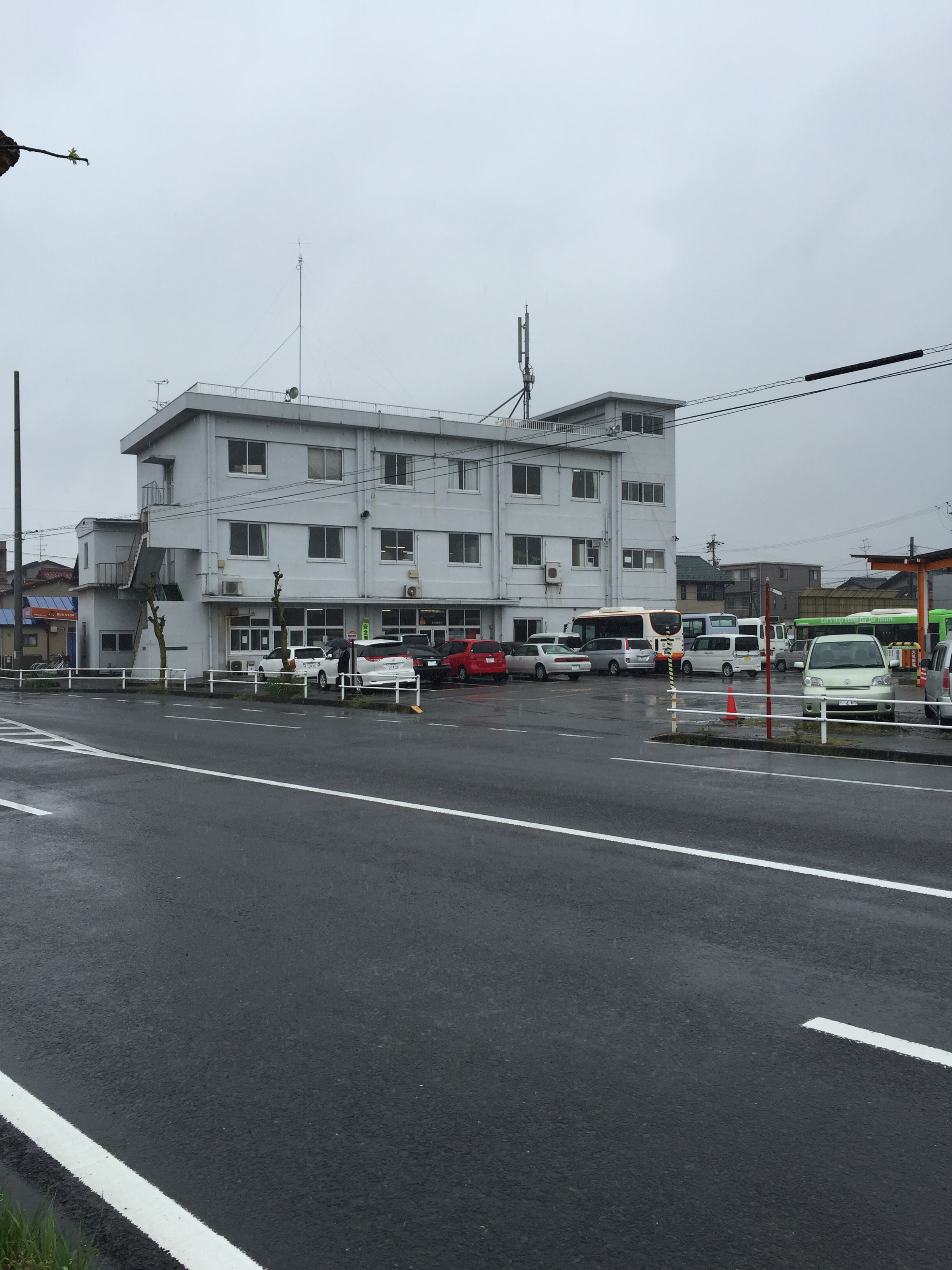 名阪近鉄バス若森営業所